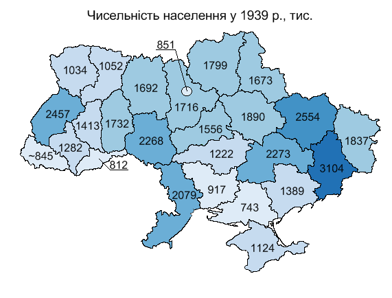 Населення регіонів України у 1939 р., тис. / Population of ukrainian regions in 1939